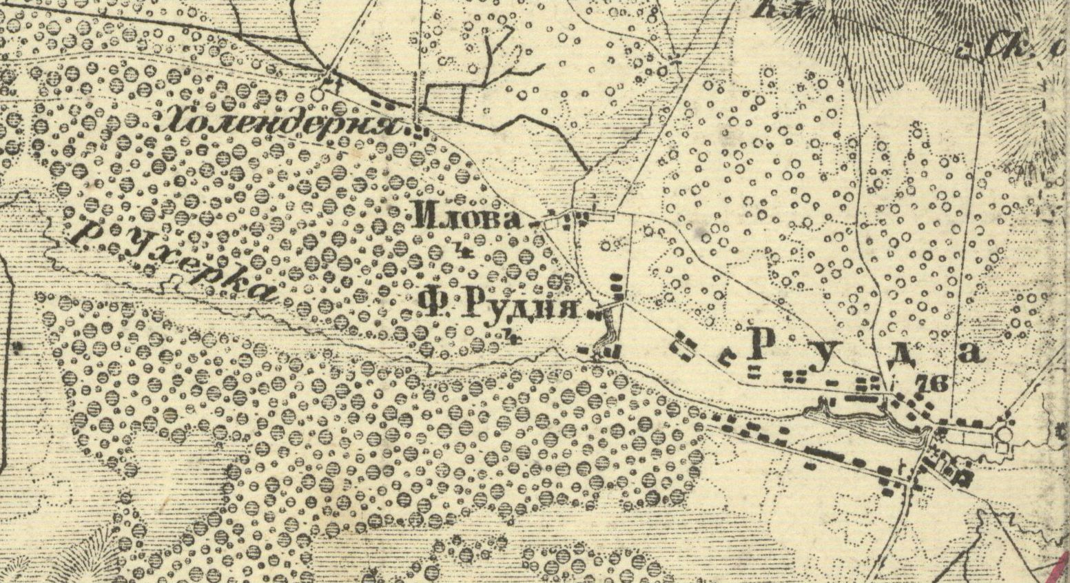 Wsie Iłowa, Rudnia i Ruda (powiat chełmski) na mapie z ok. 1887 przedstawiającej przebieg planowanej linii kolejowej Chełm-Brześć Litewski